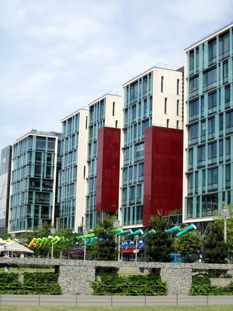 Situés sur les terrasses de Nanterre, à la sortie de la gare RER de Nanterre-Prefecture